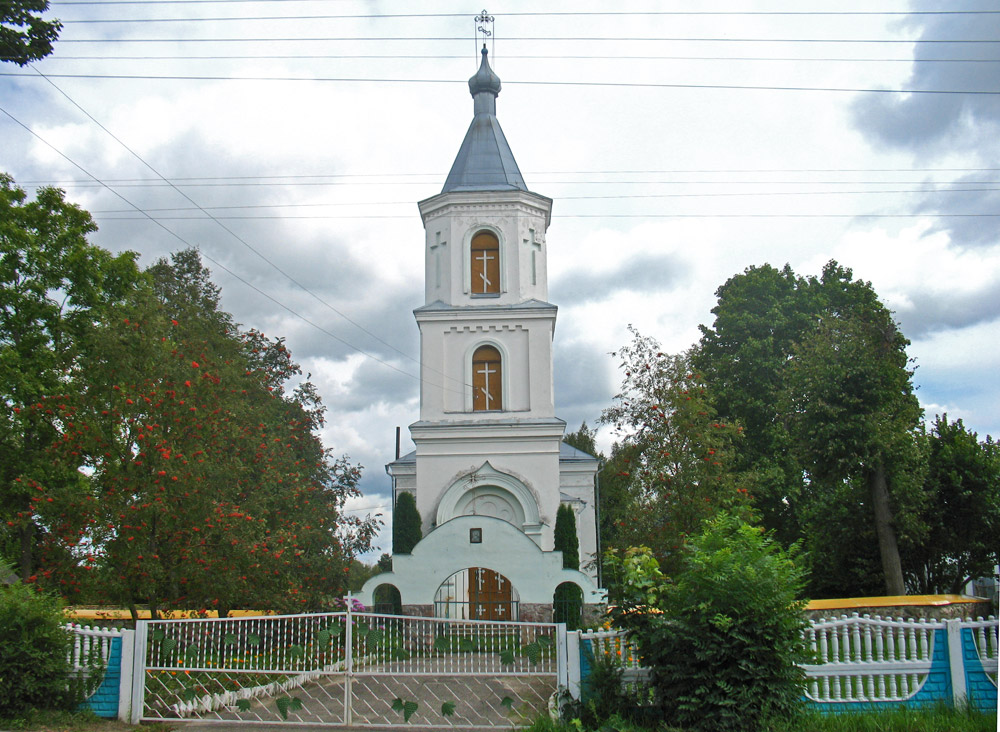 Беларуская (тарашкевіца): Крывічы (Kryvičy)